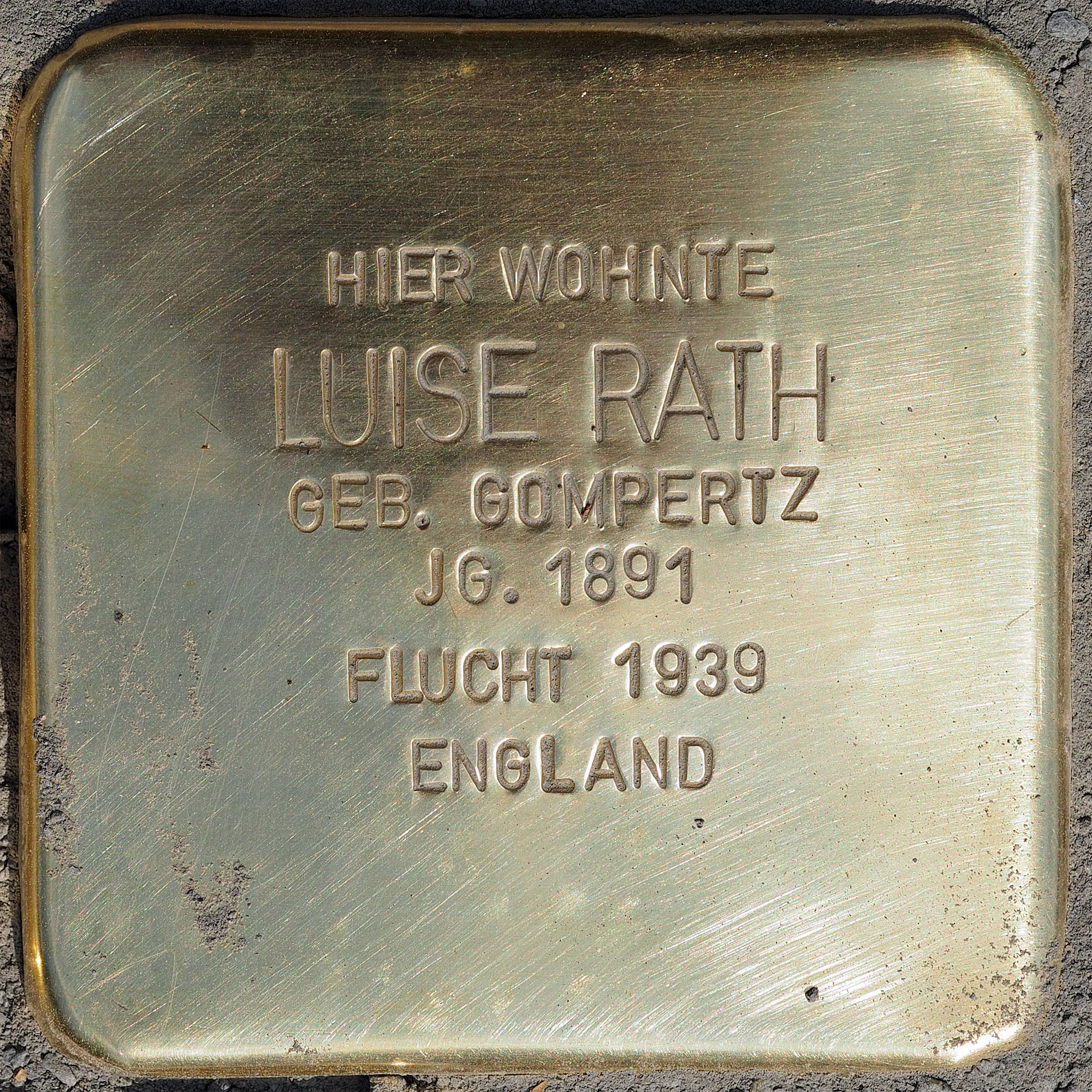 Stolpersteine Kempen: Rath, Luise